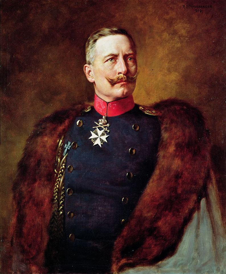 Portrait Wilhelm II., Deutscher Kaiser (1859-1941)